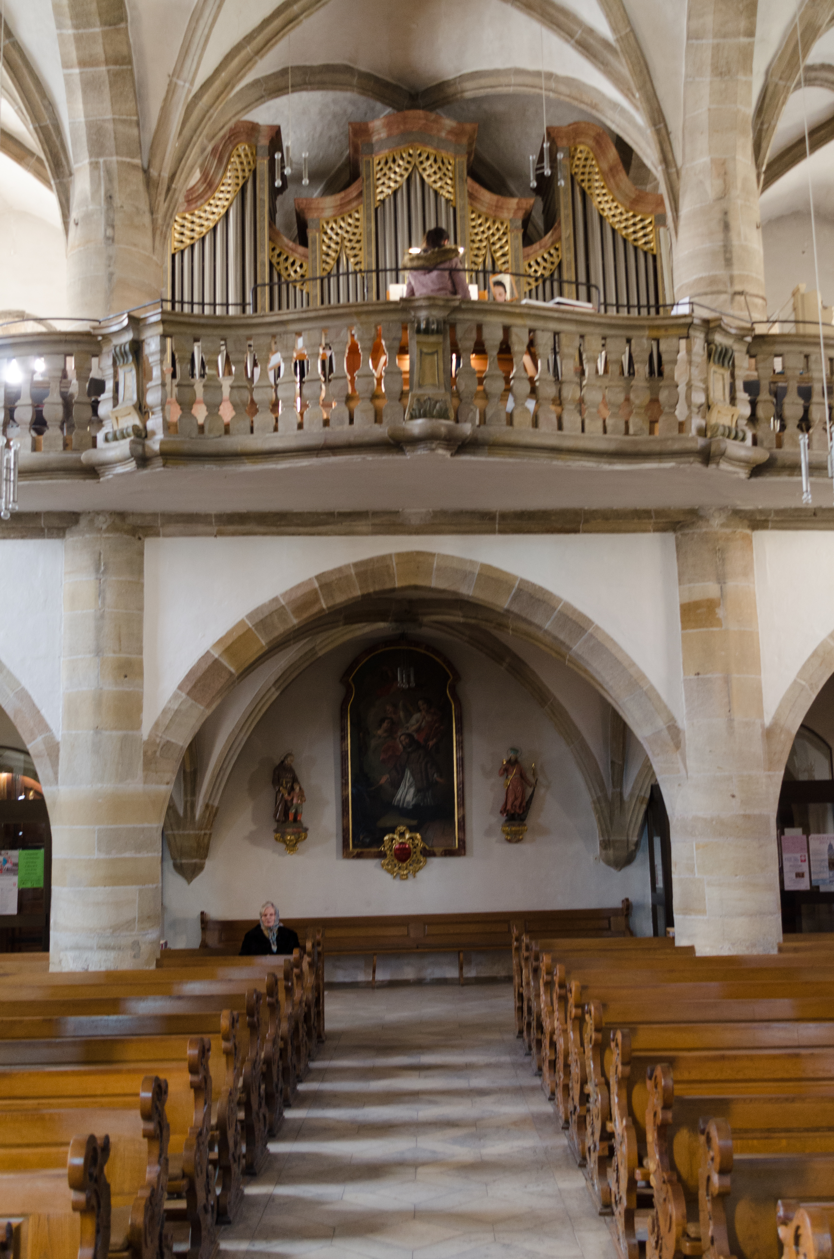 Kemnath, Stadtpfarrkirche